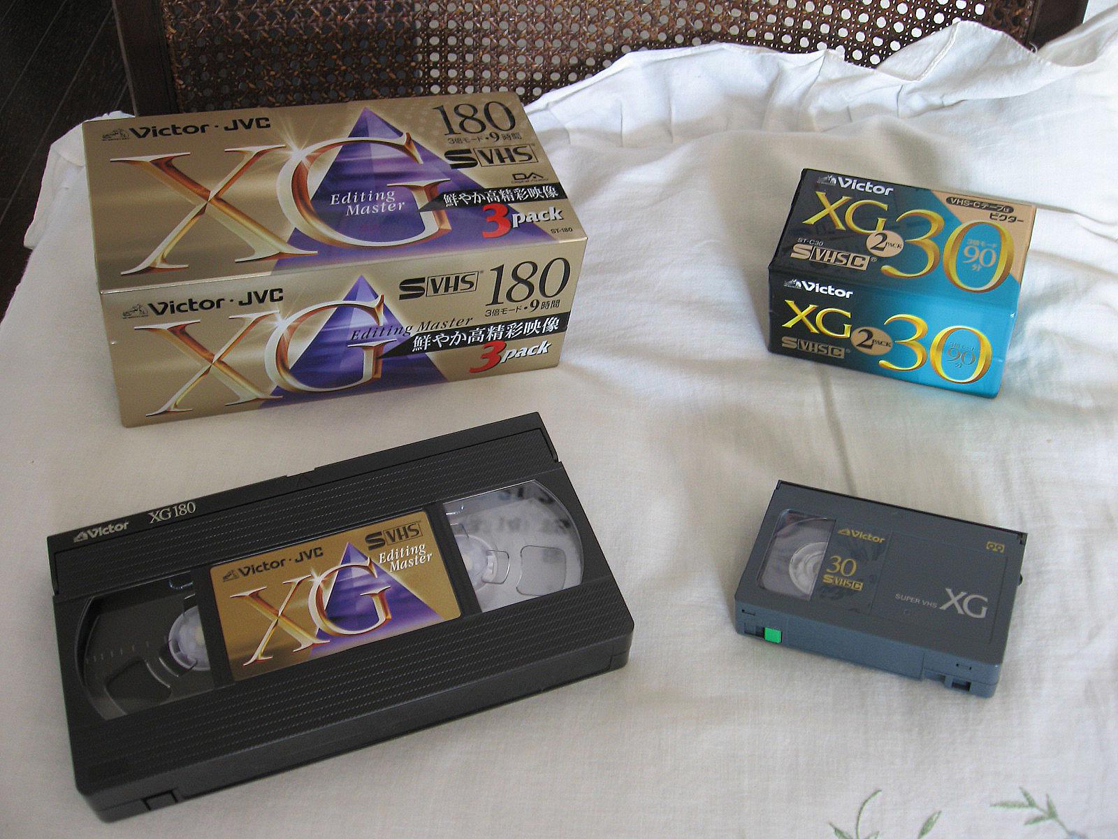 投稿者自身が買い置きのVHSカセットを撮影。 写真は、いずれも日本ビクターの製品です。 3ST-180XGK デッキ用（左） 2ST-C30XGD カムコーダ用（右）